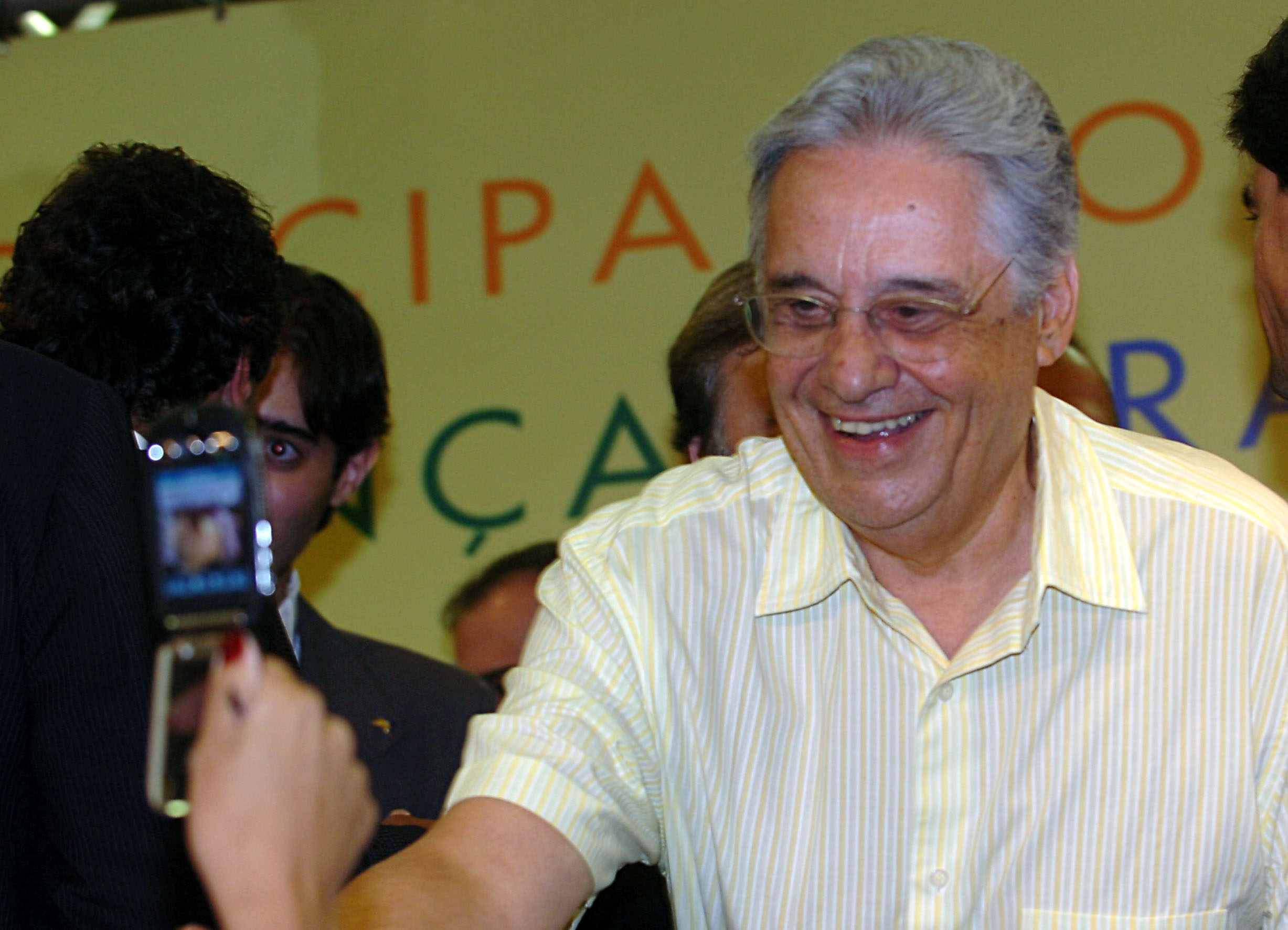 Brasília - Ex-presidente Fernando Henrique Cardoso participa de convenção nacional do PSDB